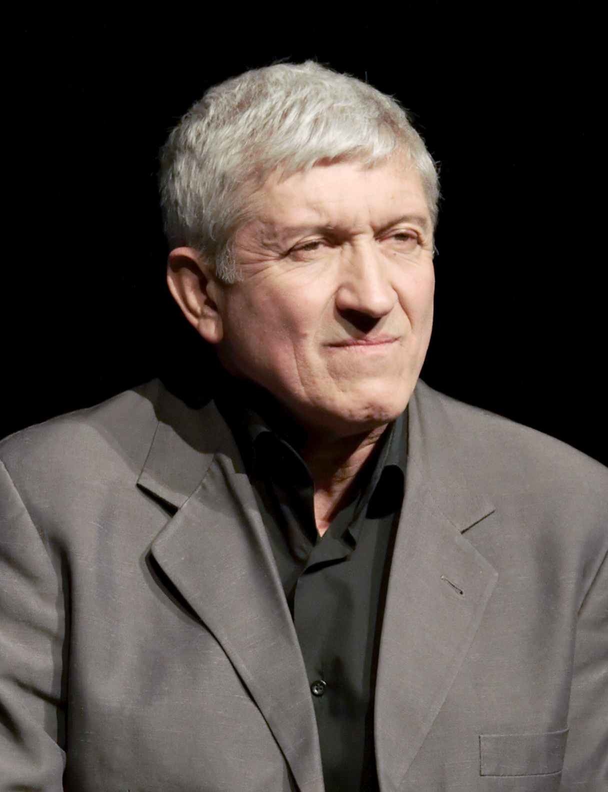 Mircea Diaconu în piesa "Variațiuni enigmatice" (Toronto, aprilie 2011)